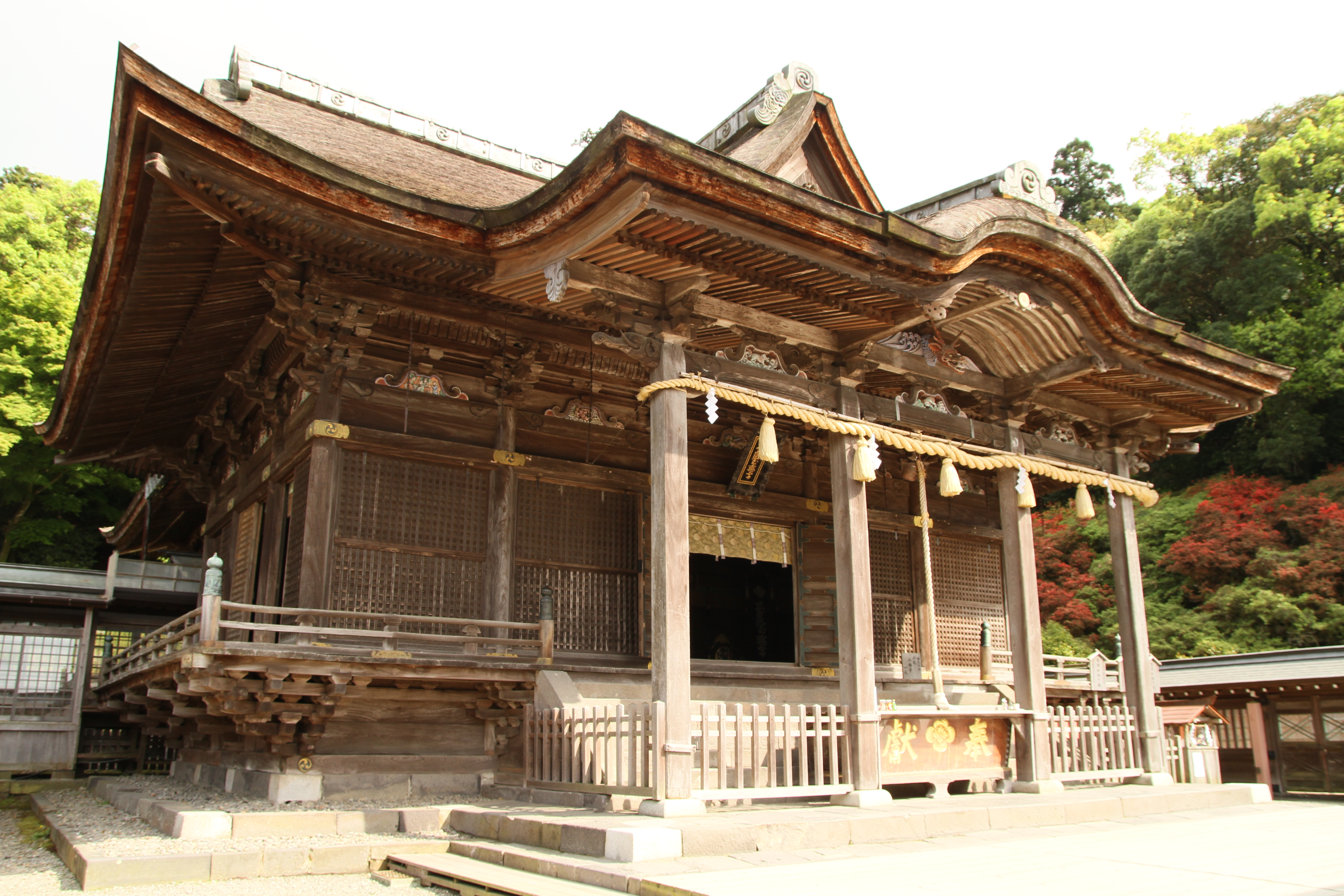 高良大社拝殿（重要文化財）